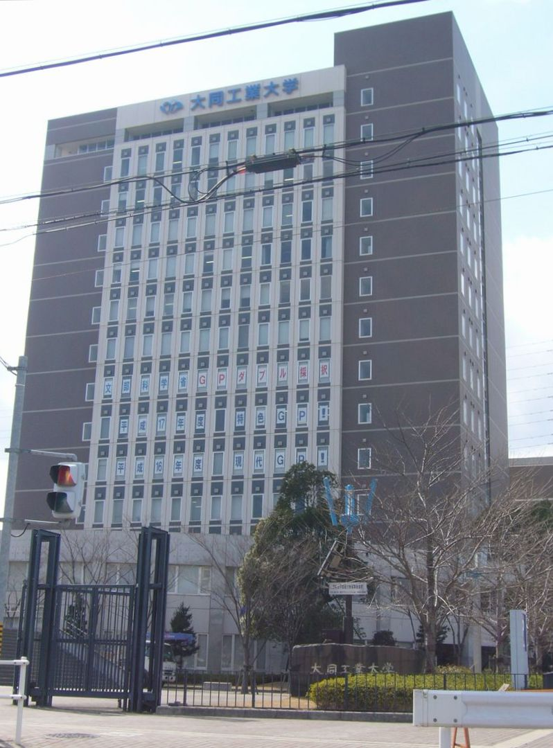 大同工業大学